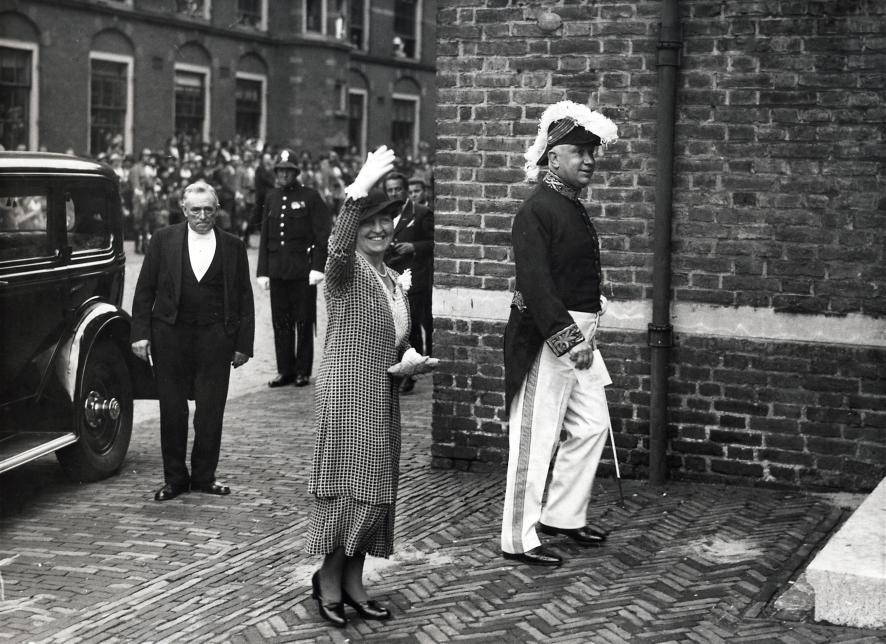 Schaik, J.R.H. van (KVP). Minister van Schaik in ministersuniform bij de opening van de Staten Generaal / Prinsjesdag. Nederland, Den Haag, [1934].